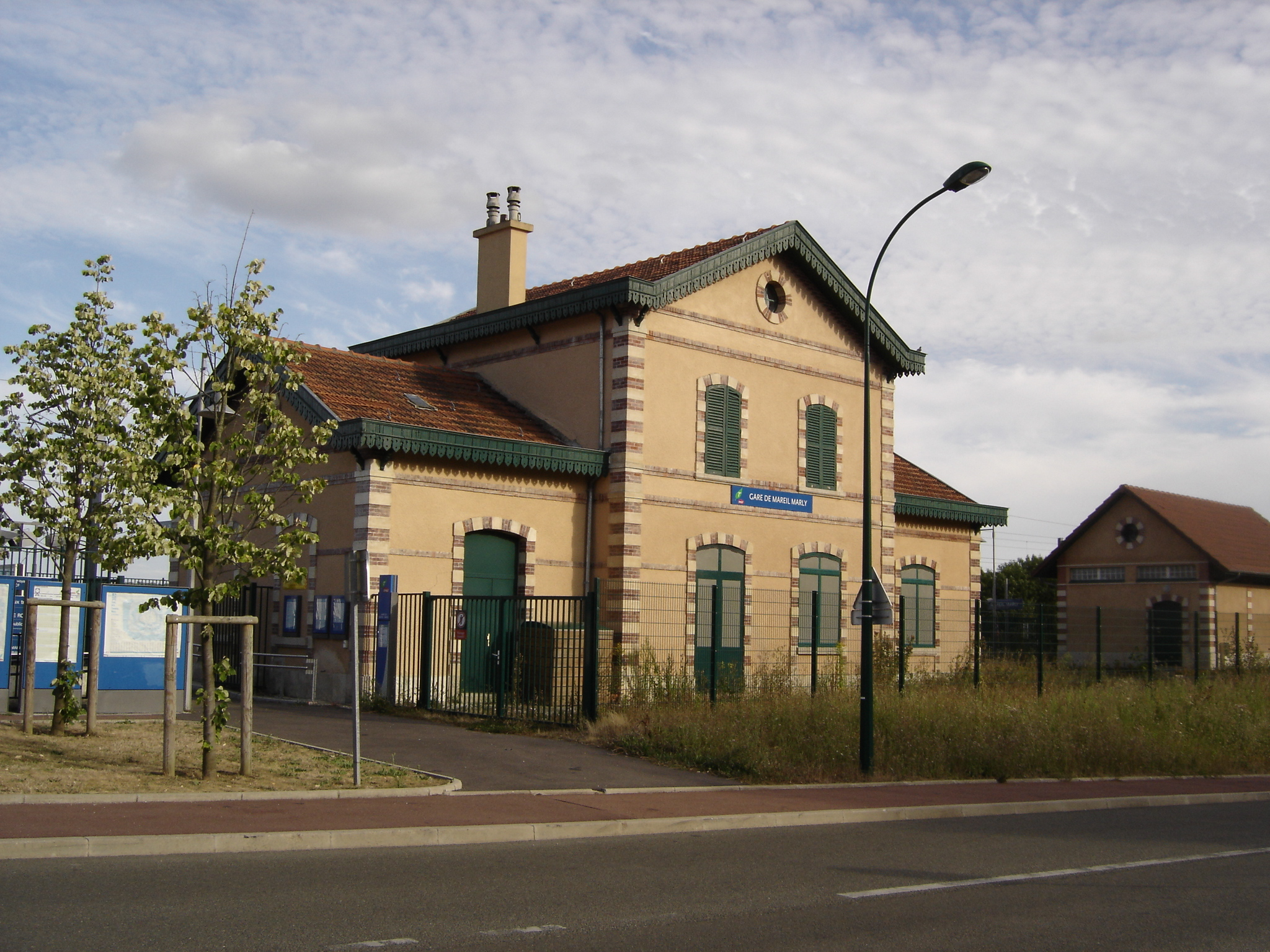 Gare de Mareil-Marly. Vue de la rue.